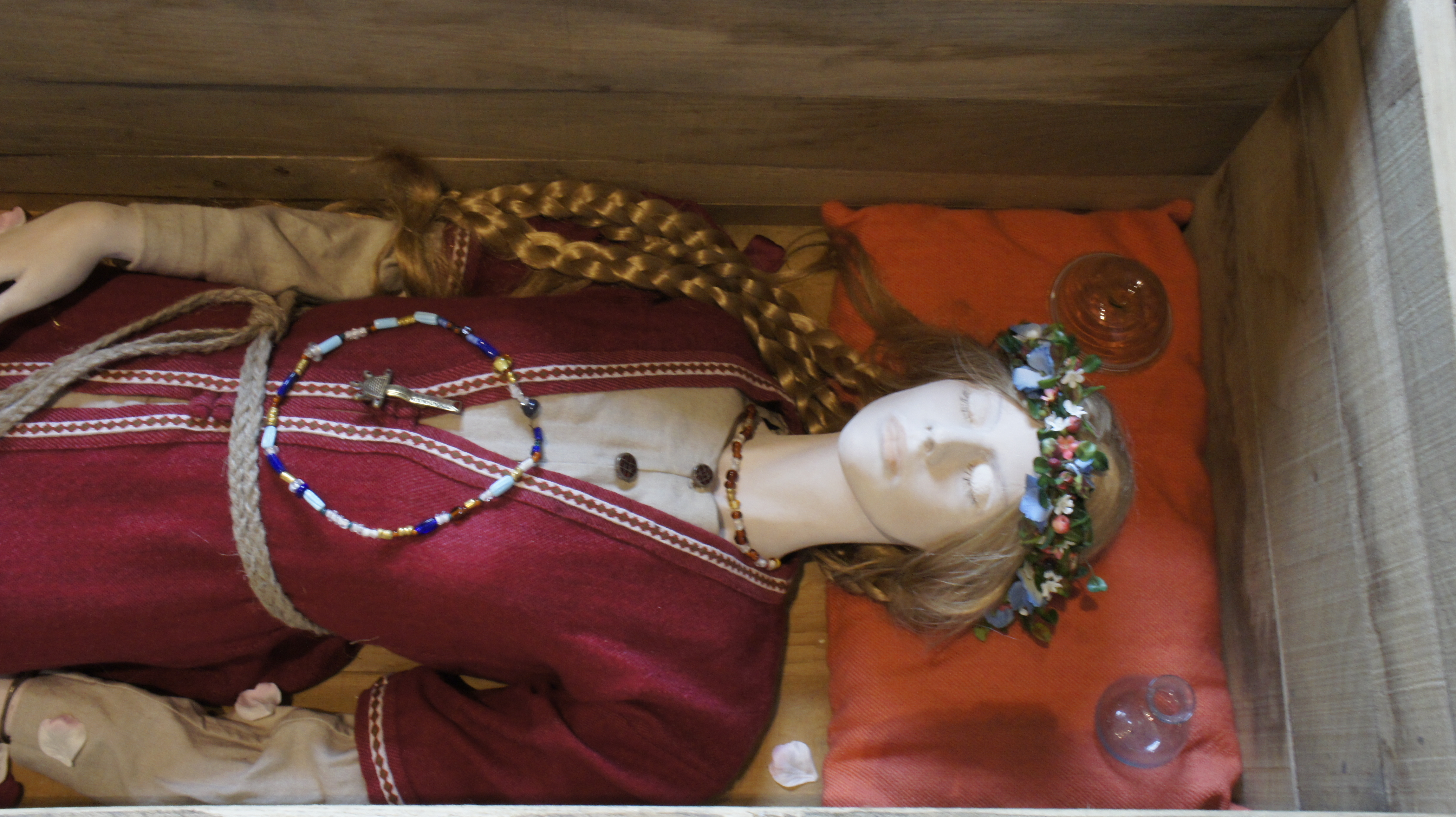 Présenté lors de son passage au musée de Reims . Réalisation des artéfacts : Arian Ziliox, Réalisation de la scénographie : Agence Zen+dCo